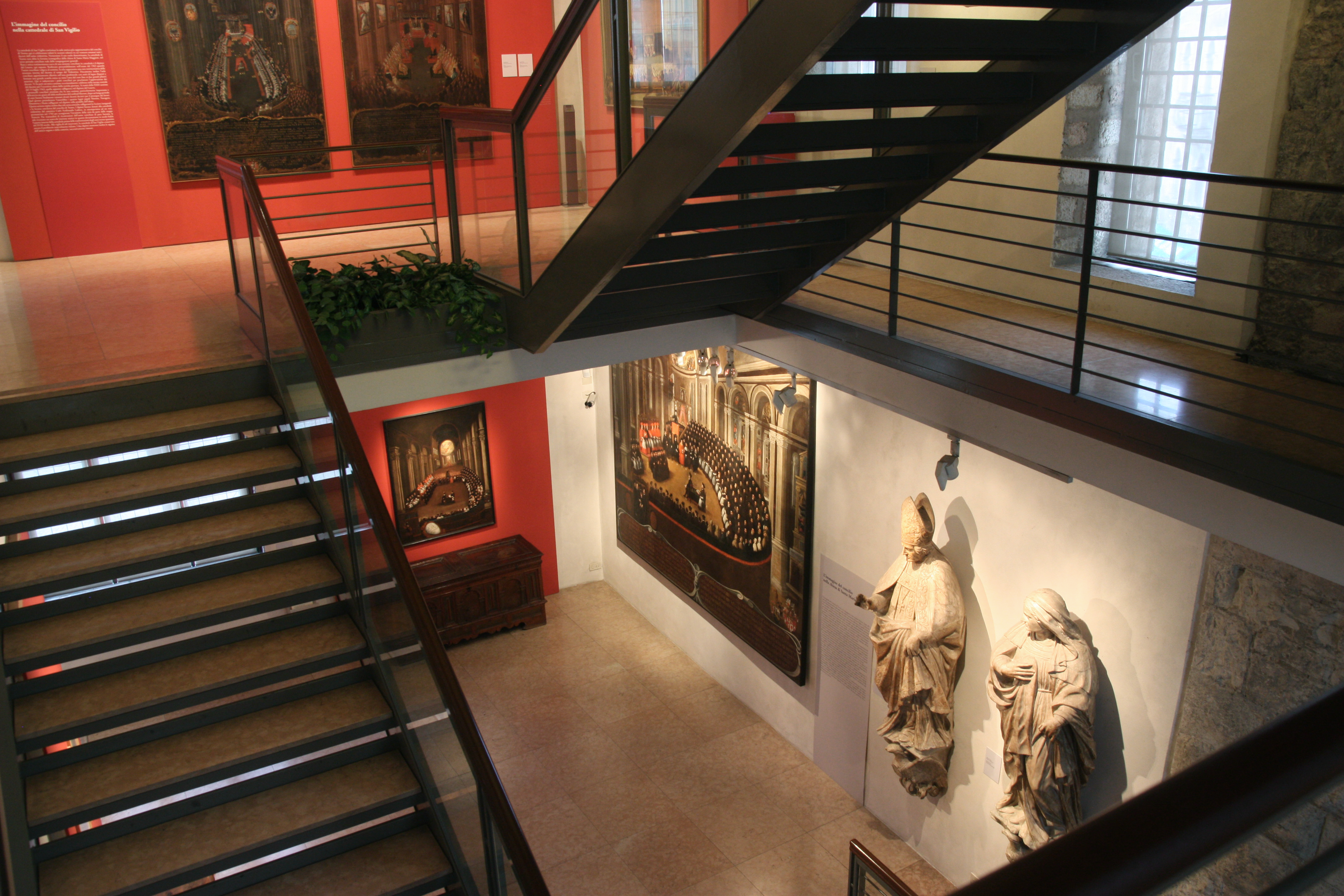 Veduta dalle scale che dal primo piano portano al secondo.